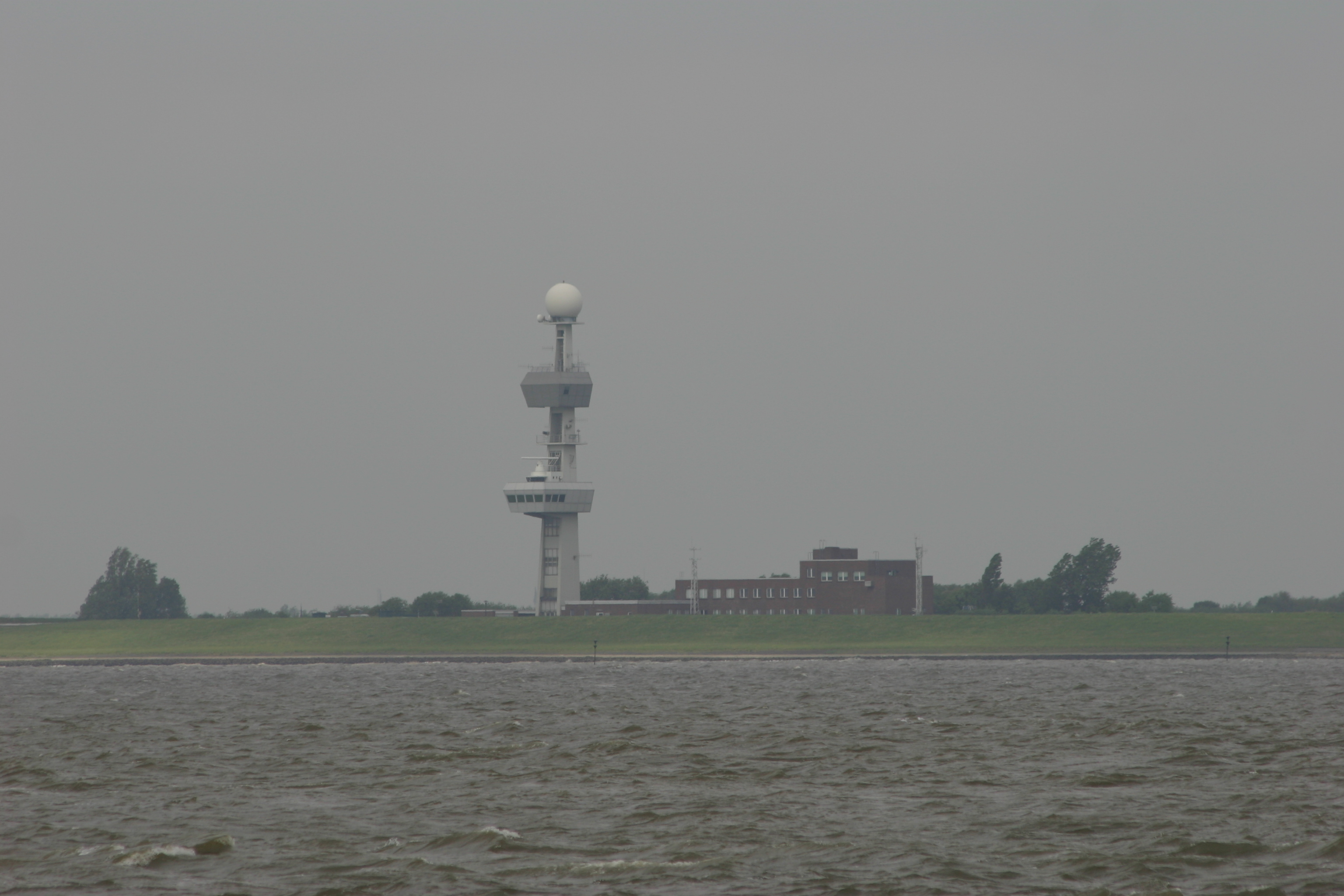 Verkehrszentrale Ems an der Knock in Emden, ostfriesland, Niedersachsen